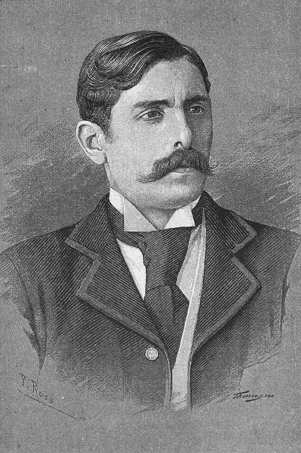 José Miró (Julián Martel.